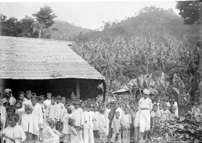 Negatief. Deze foto is gemaakt tijdens de Siboga Expeditie van 1899-1900.. Een markt op het eiland Siaoe Unknown language: Drukte op de pasar op het eiland Siaoe (Sangine Eil).